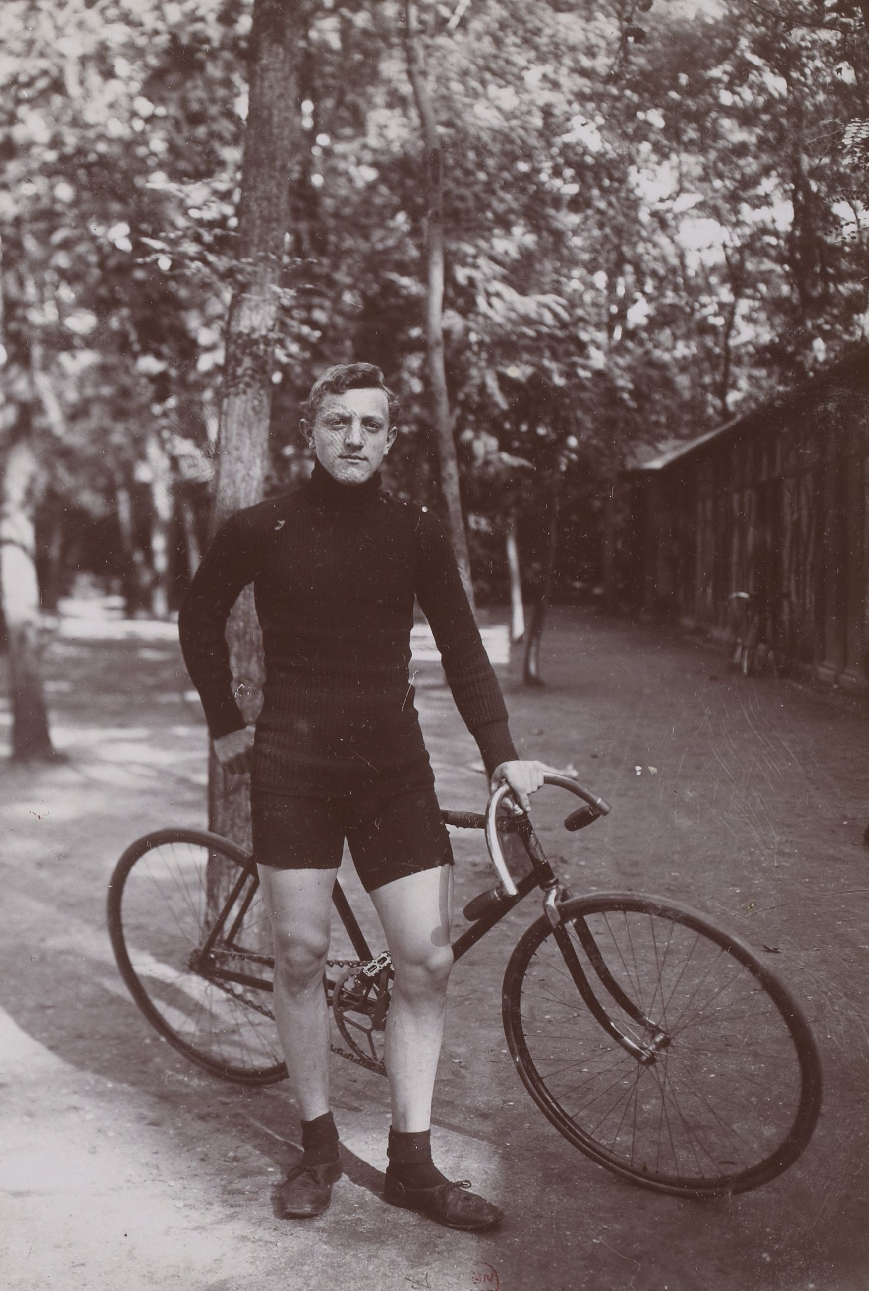 [Collection Jules Beau. Photographie sportive] : T. 14. Année 1901 / Jules Beau : F. 36. [Grand Prix [cycliste] de Paris, 15, 19, 22 septembre 1901]